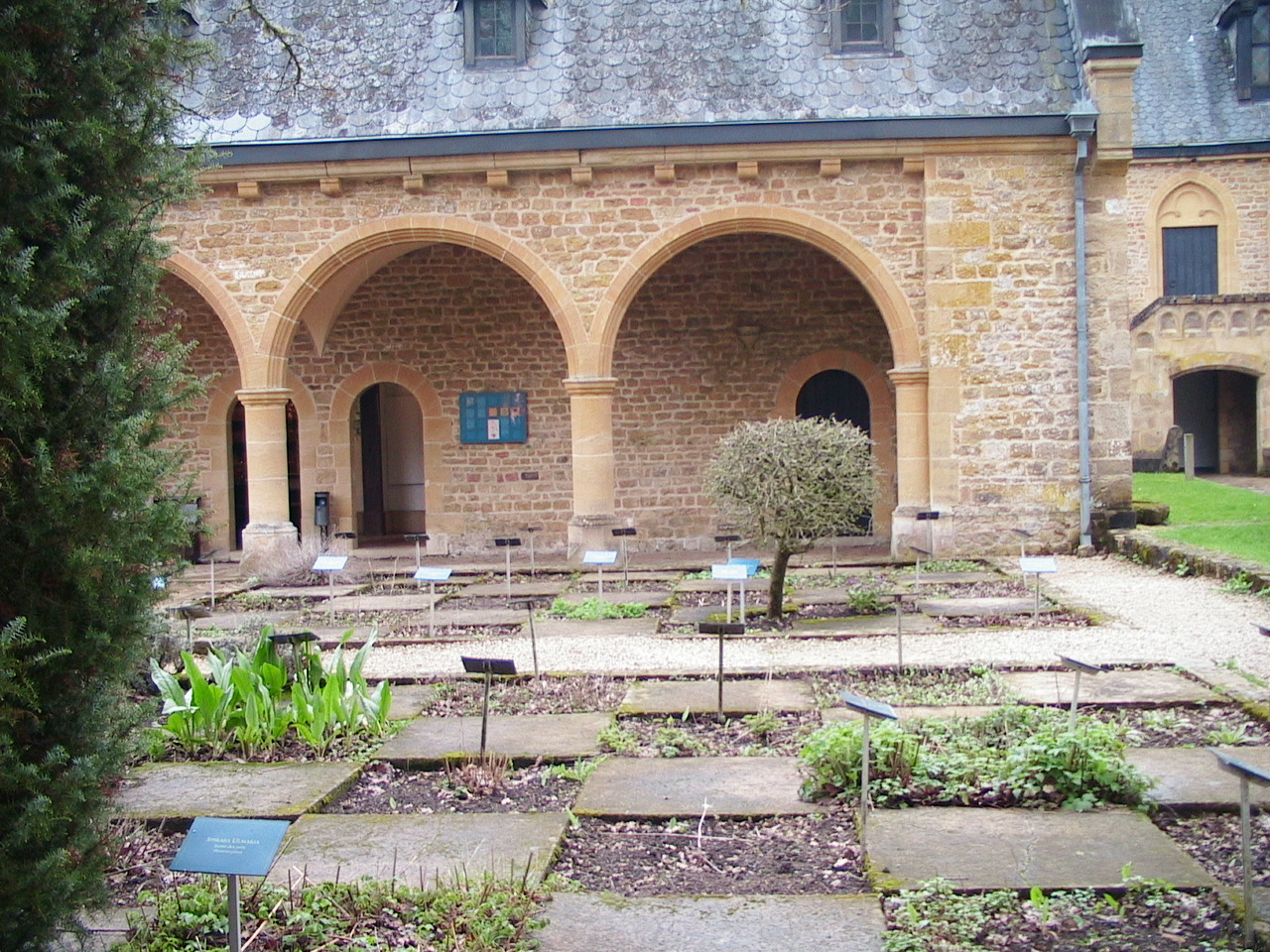 L'abbaye d'Orval (Belgique) : l'herboristerie reconstruite et le jardin aux simples.